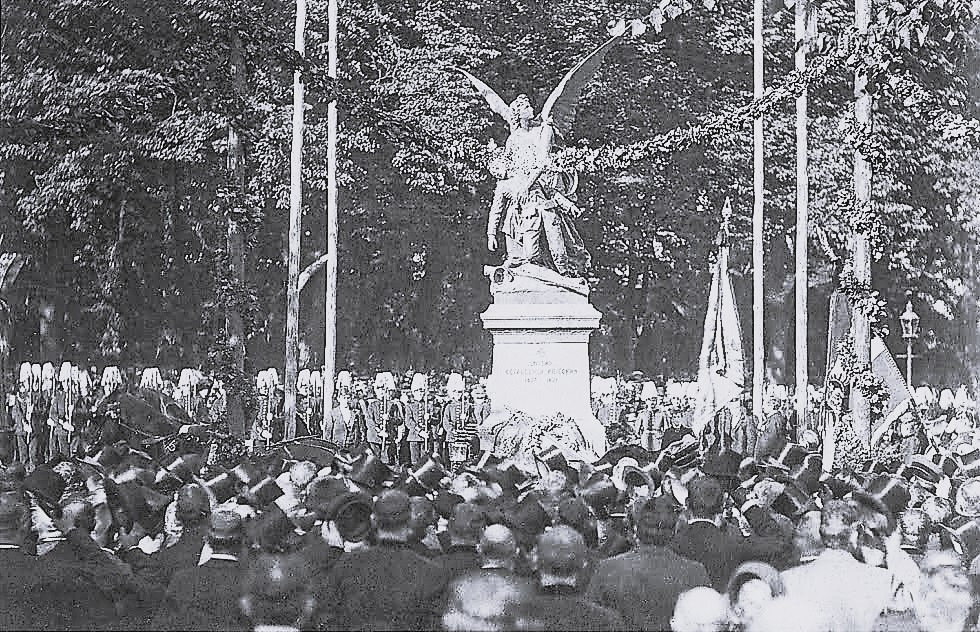 1899, Einweihung des Neustrelitzer „Landes-Krieger-Denkmal“ für die Gefallenen des Krieges 1870–1871. Bildhauer: Martin Wolff